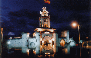 Ecuador_Loja-Puerta_de_entrada_a_la_ciudad photography by myself M@verick